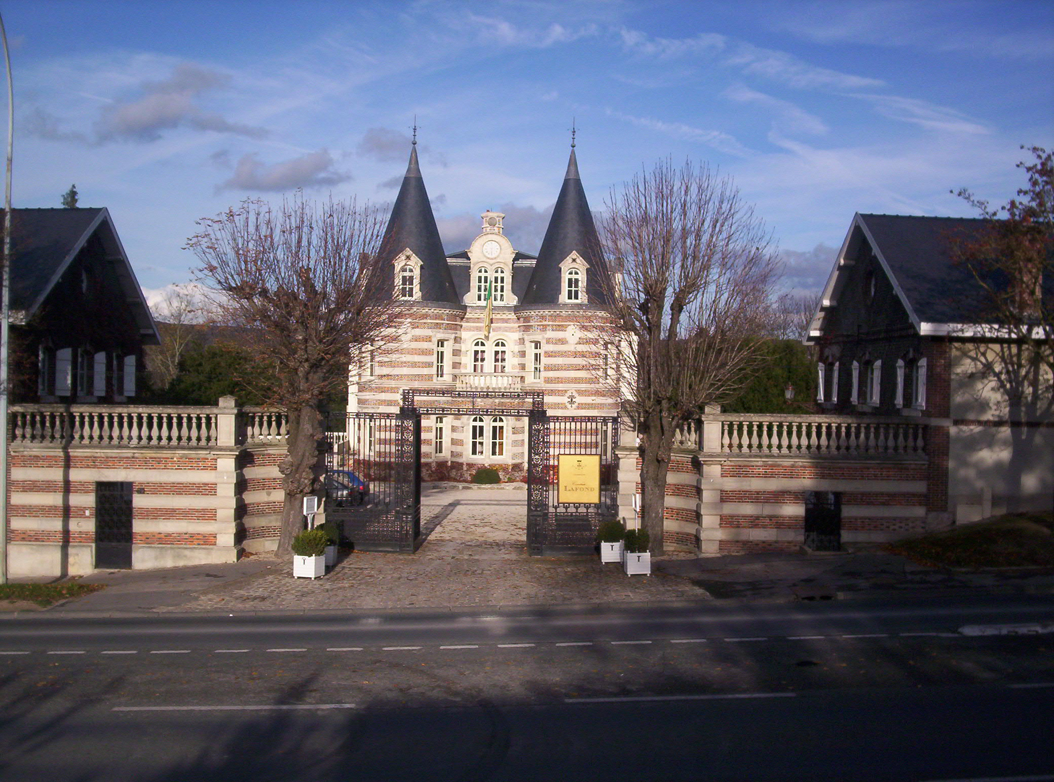 Épernay - Bâtiment du Champagne Lafond sur l'avenue de champagne (sortie vers Châlons-en-champagne), château de Pékin.